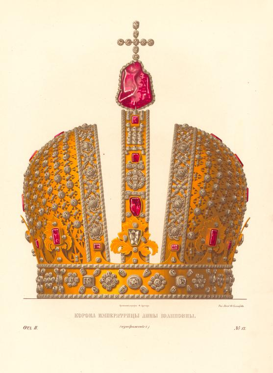 Корона императрицы Анны Иоановны